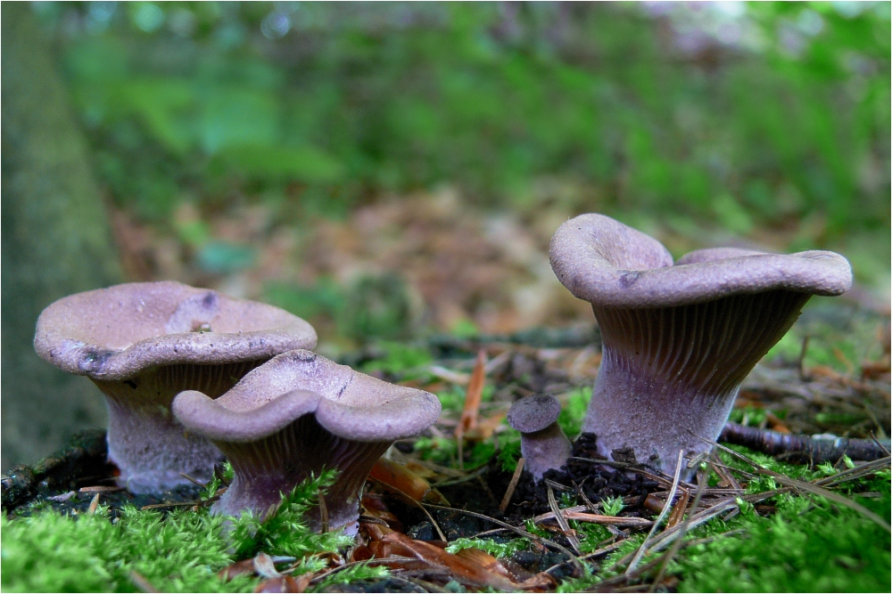 Laubholz-Knäueling (Lentinus torulosus)